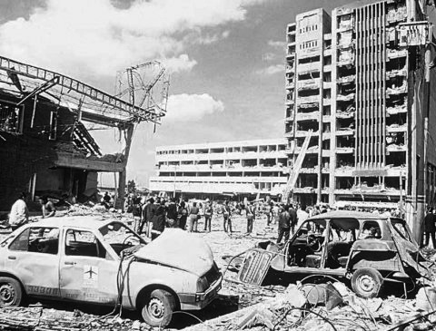 صورة لمبنى هيئة إدارة الامن في كولومبيا بعد محاولة الأغتيال الفاشلة